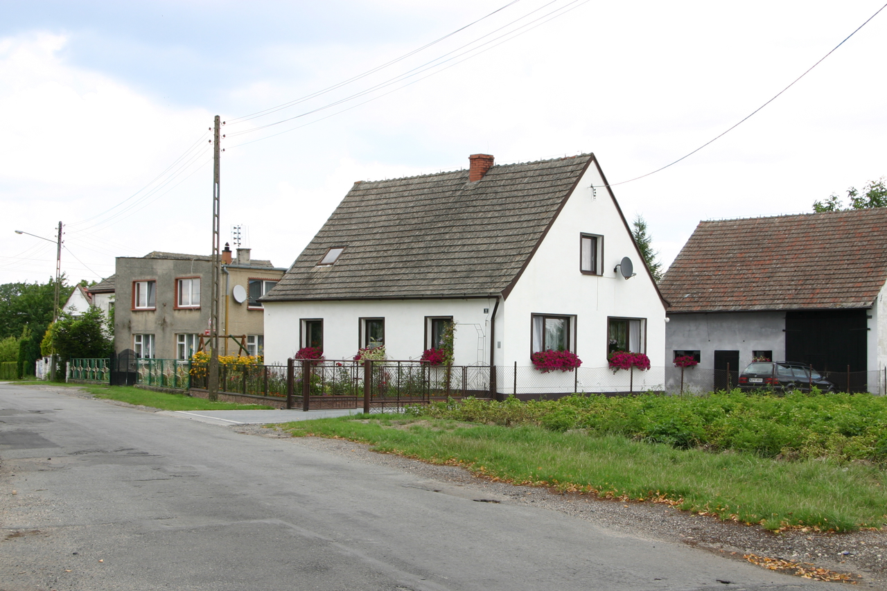 Brzeźnica (dodatkowa nazwa w j. niem. Bresnitz) – wieś w Polsce położona w województwie opolskim, w powiecie prudnickim, w gminie Biała.